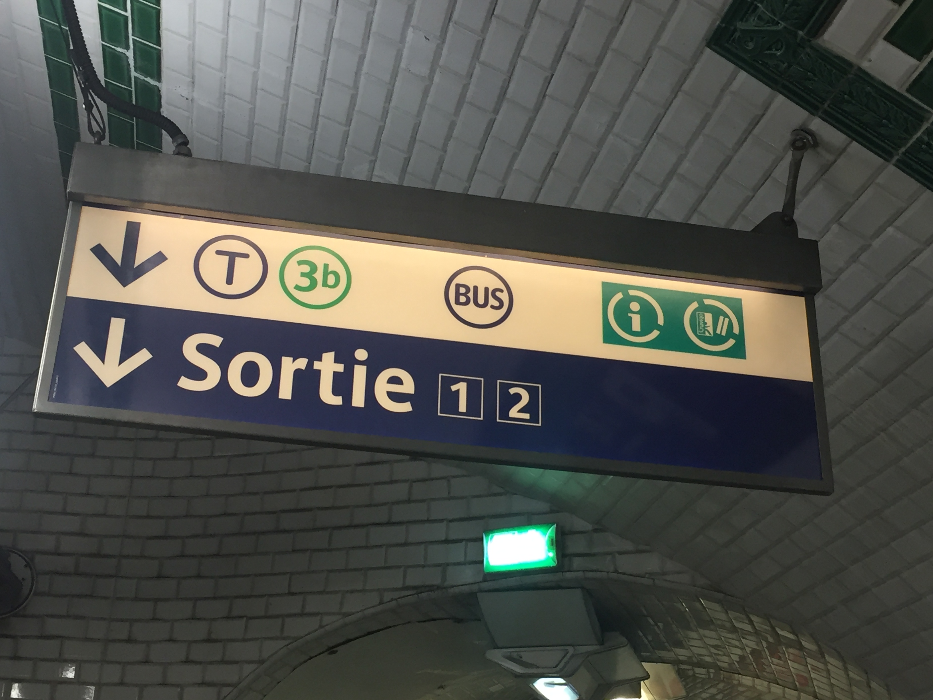 Les quais de la station de métro Porte de Saint-Ouen indiquent depuis novembre 2018 la correspondance avec le tramway T3b.